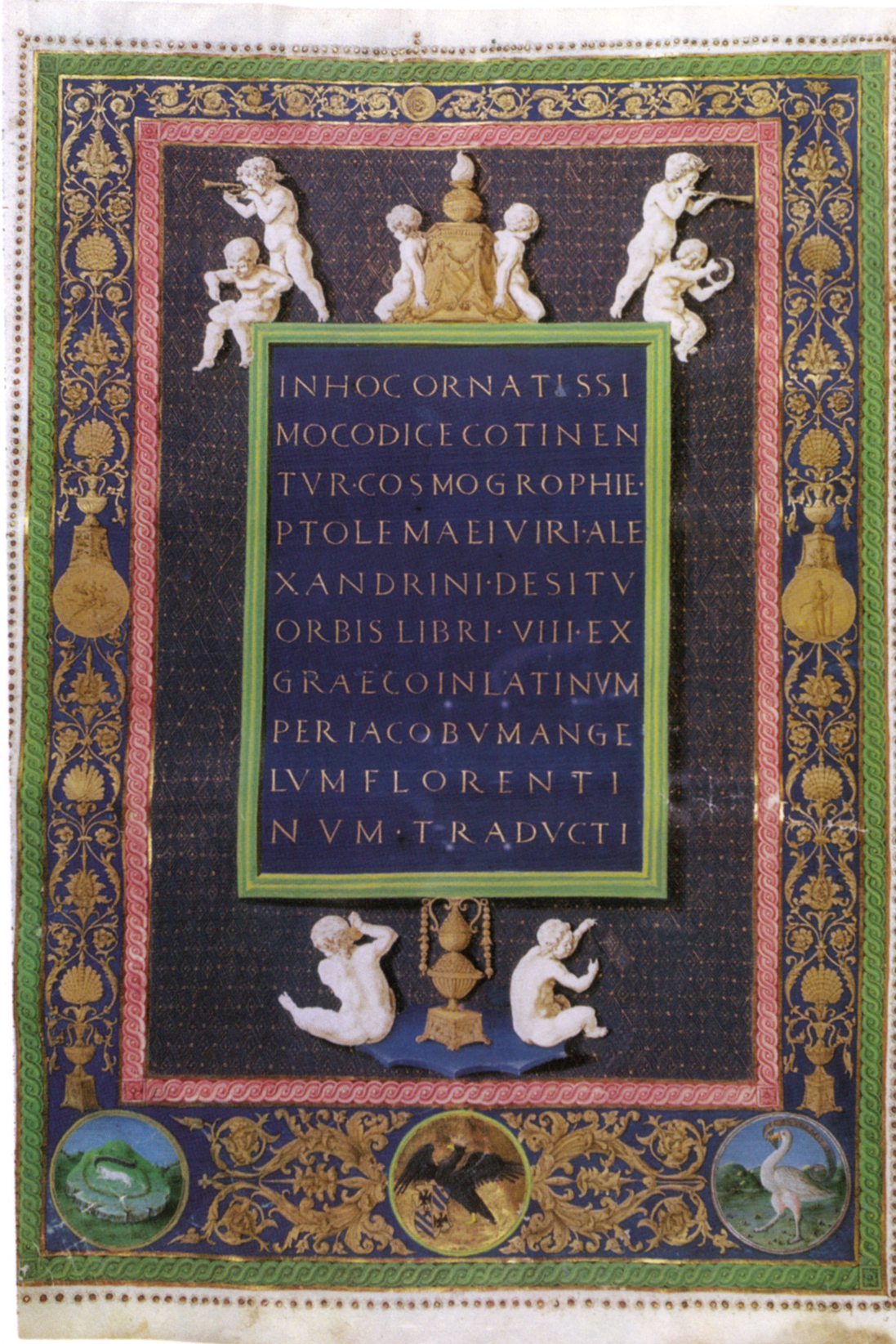 Francesco rosselli, comographia di tolomeo, biblioteca ap vaticana, ms urb lat 277 f 1v